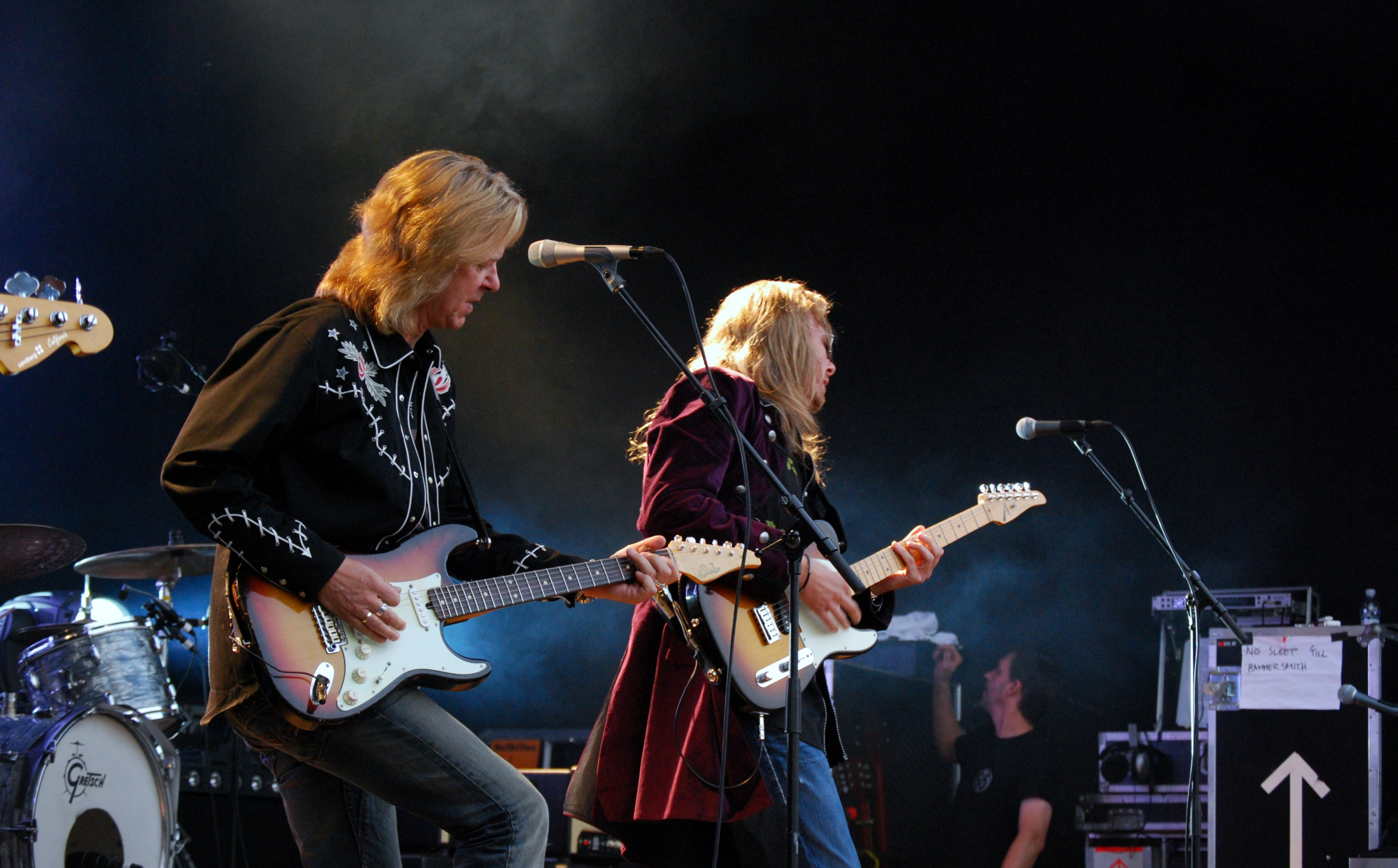 Hellbillies under en konsert i Langesund juli 2011.